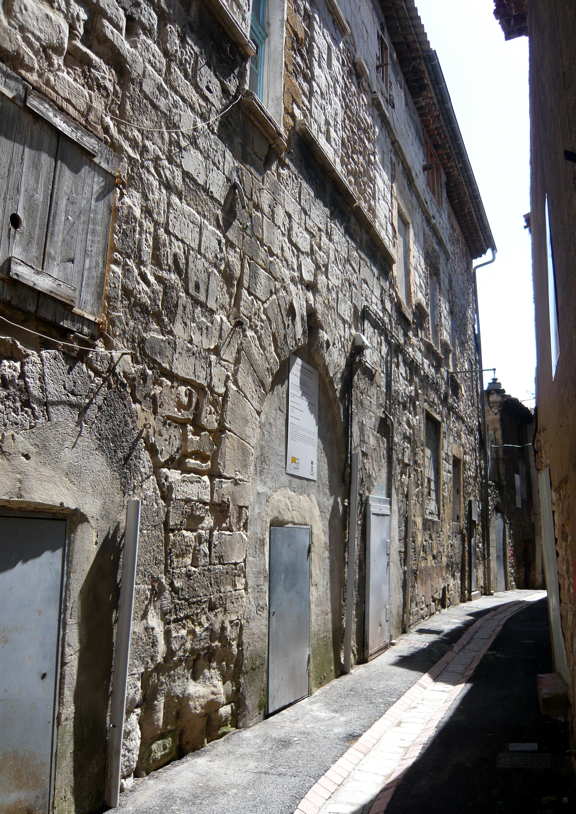 Ancienne synagogue, rue Paul Bert, Trets, Bouches-du-Rhône (France).